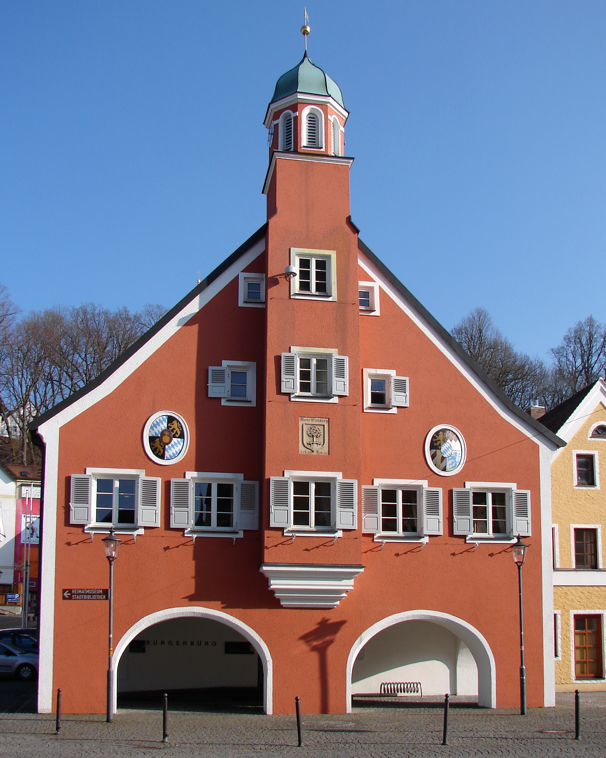 Altes Rathaus von Mainburg